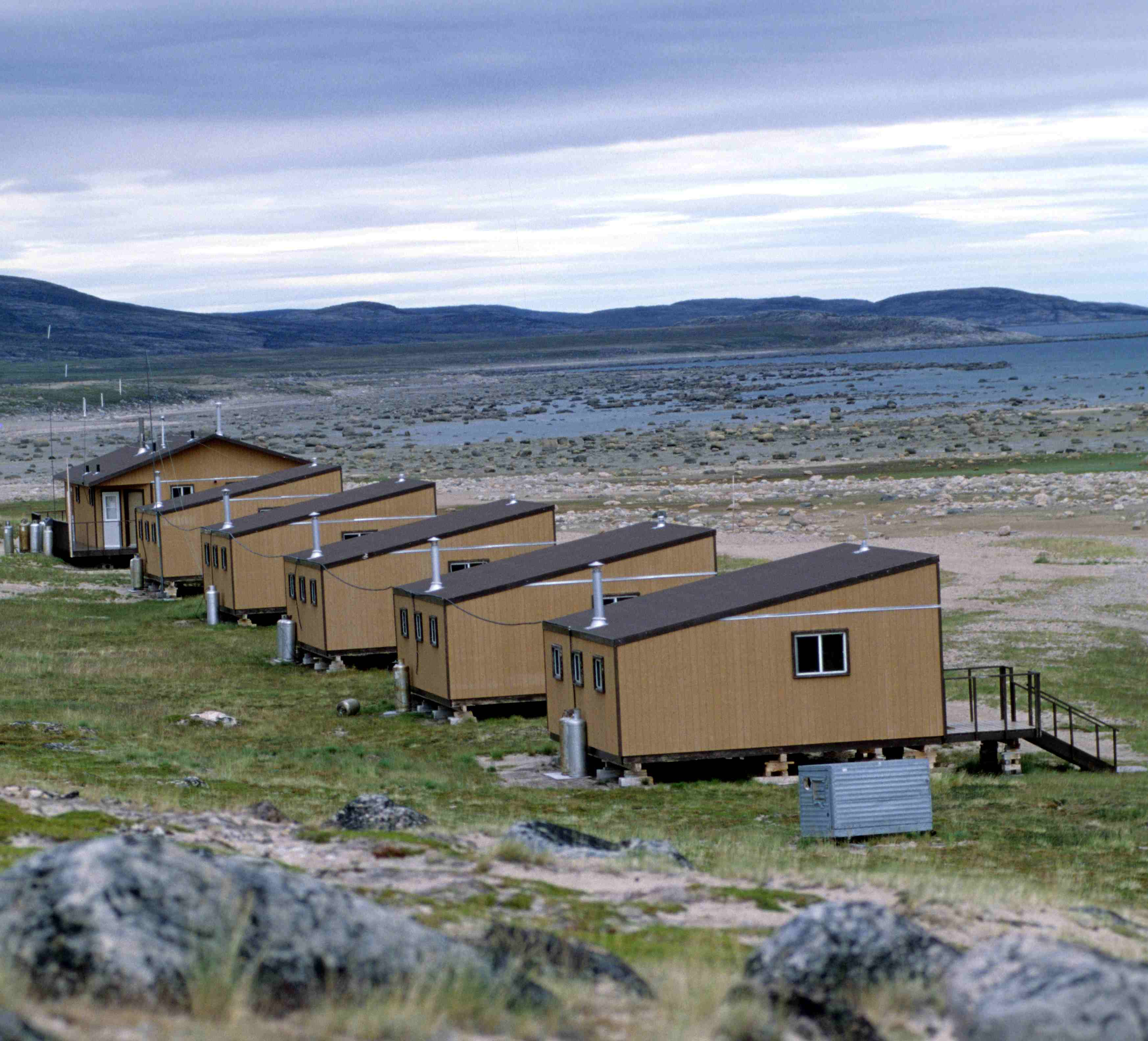 Sila Lodge at Wager Bay (Ukkusiksalik National Park, Nunavut, Canada)